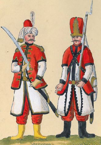 73. Chorągiew janczarska Buławy Wielkiej Koronnej (oficer i szeregowy chorągwi strzeleckiej (węgierskiej, janczarskiej) BWL)